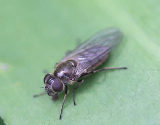 Bärlauch-Erzschwebfliege (Cheilosia fasciata), Weibchen, am 22. März 2019 nahe Walldorf/Baden